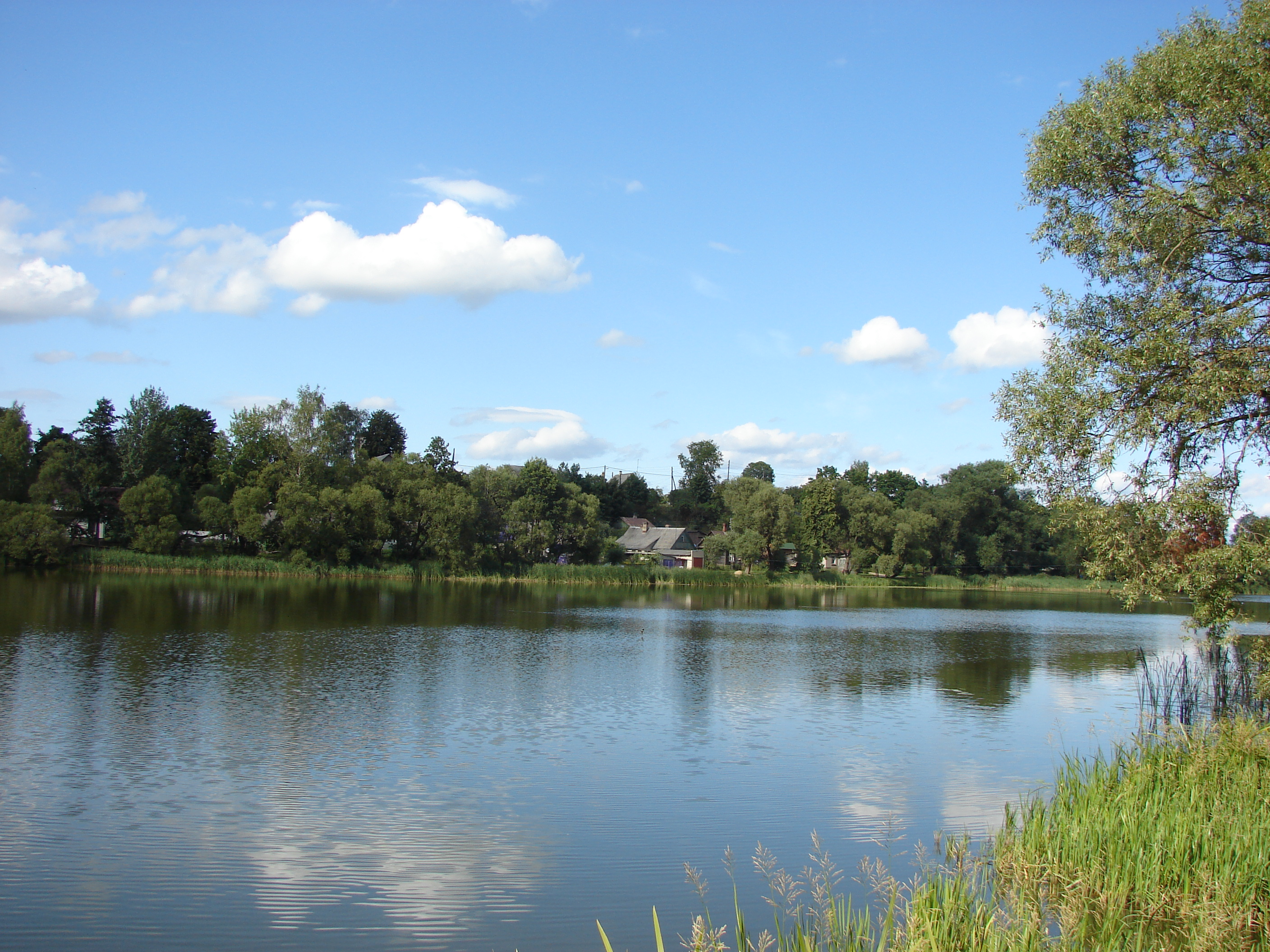 Mazais Ludzas ezers